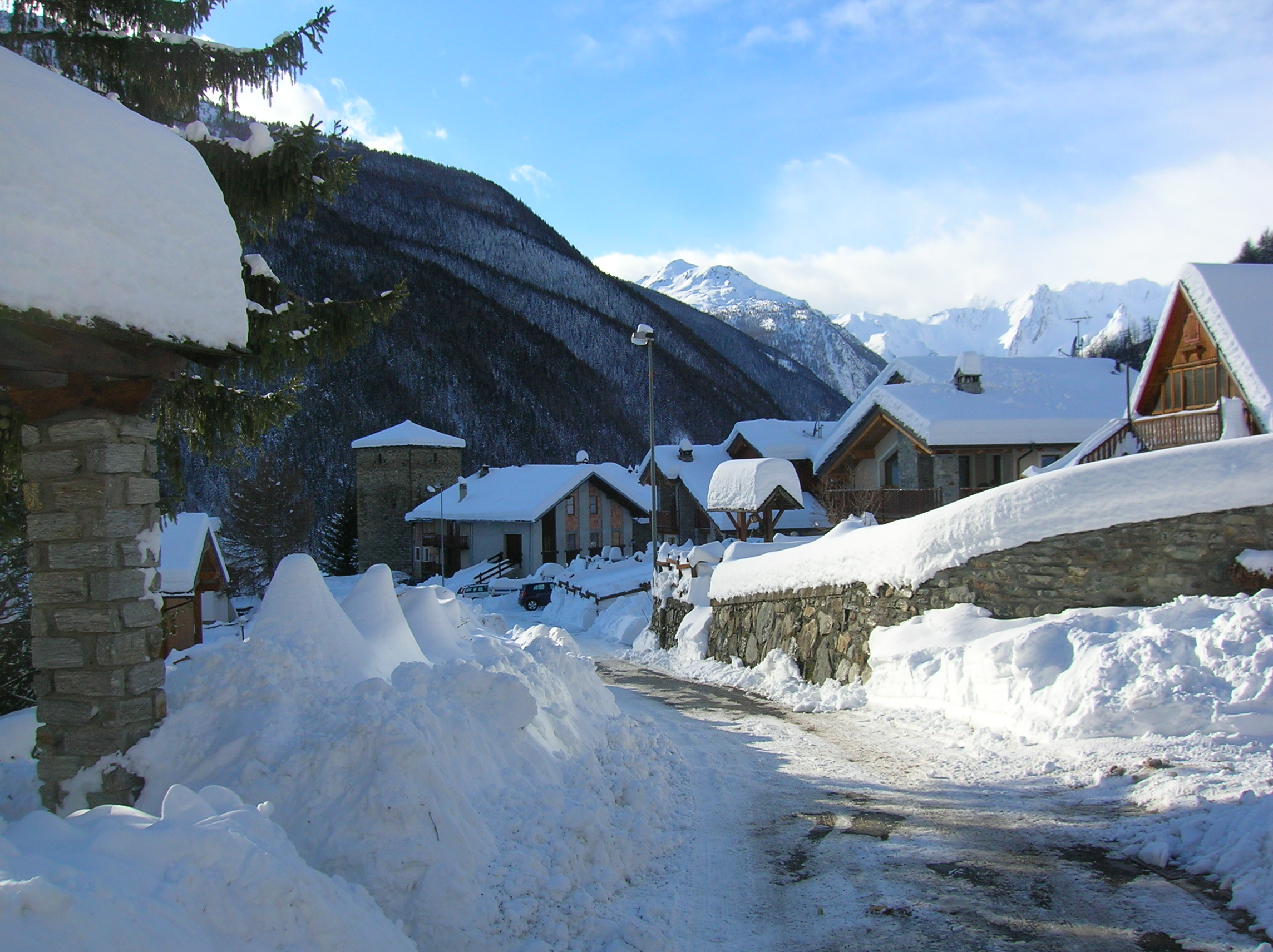 "Torre della Vachère", Torre medievale in località Vachéry - Etroubles, Valle d'Aosta, Italia.